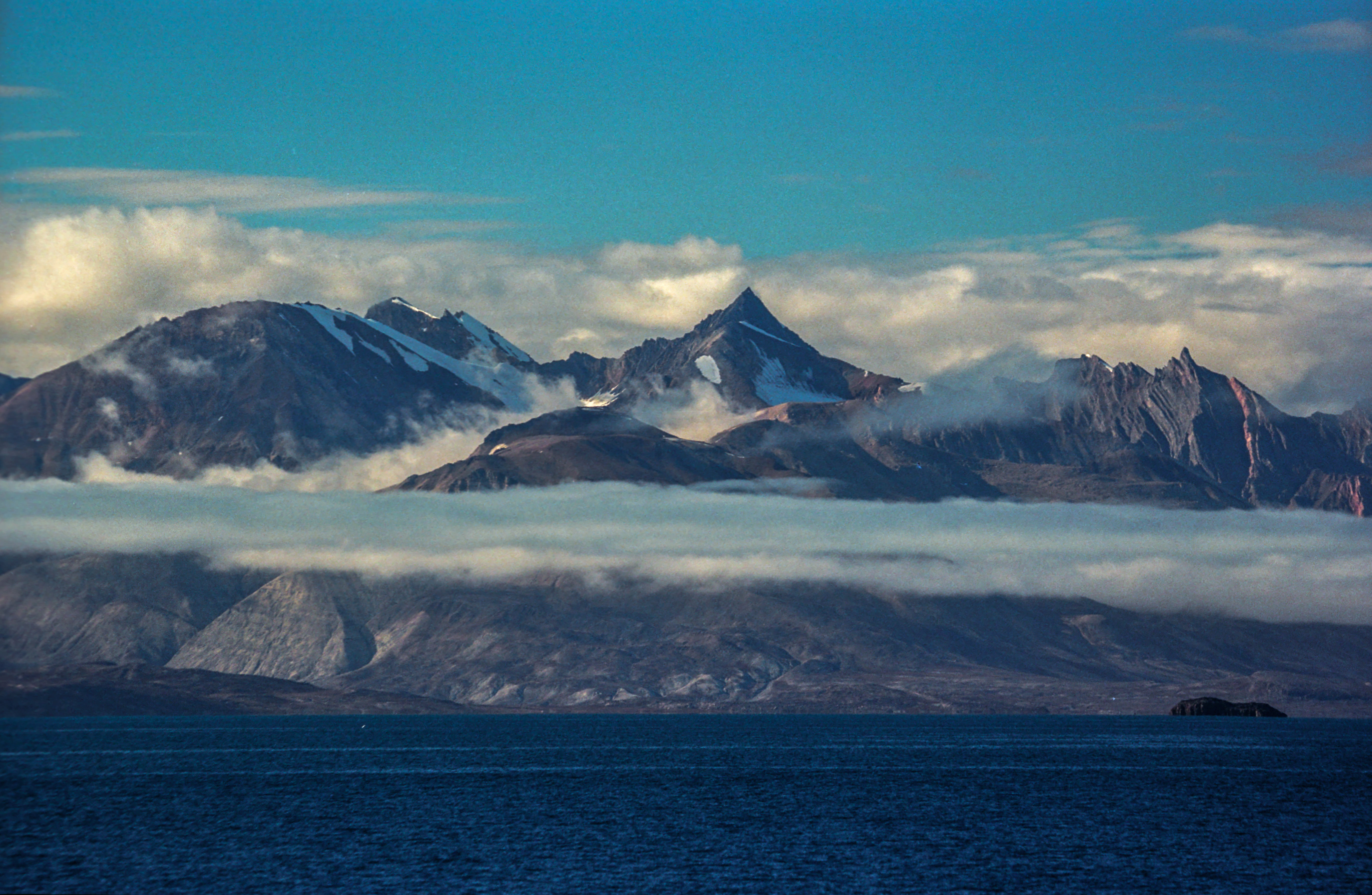 Franz Josef Fjord, Iceberg